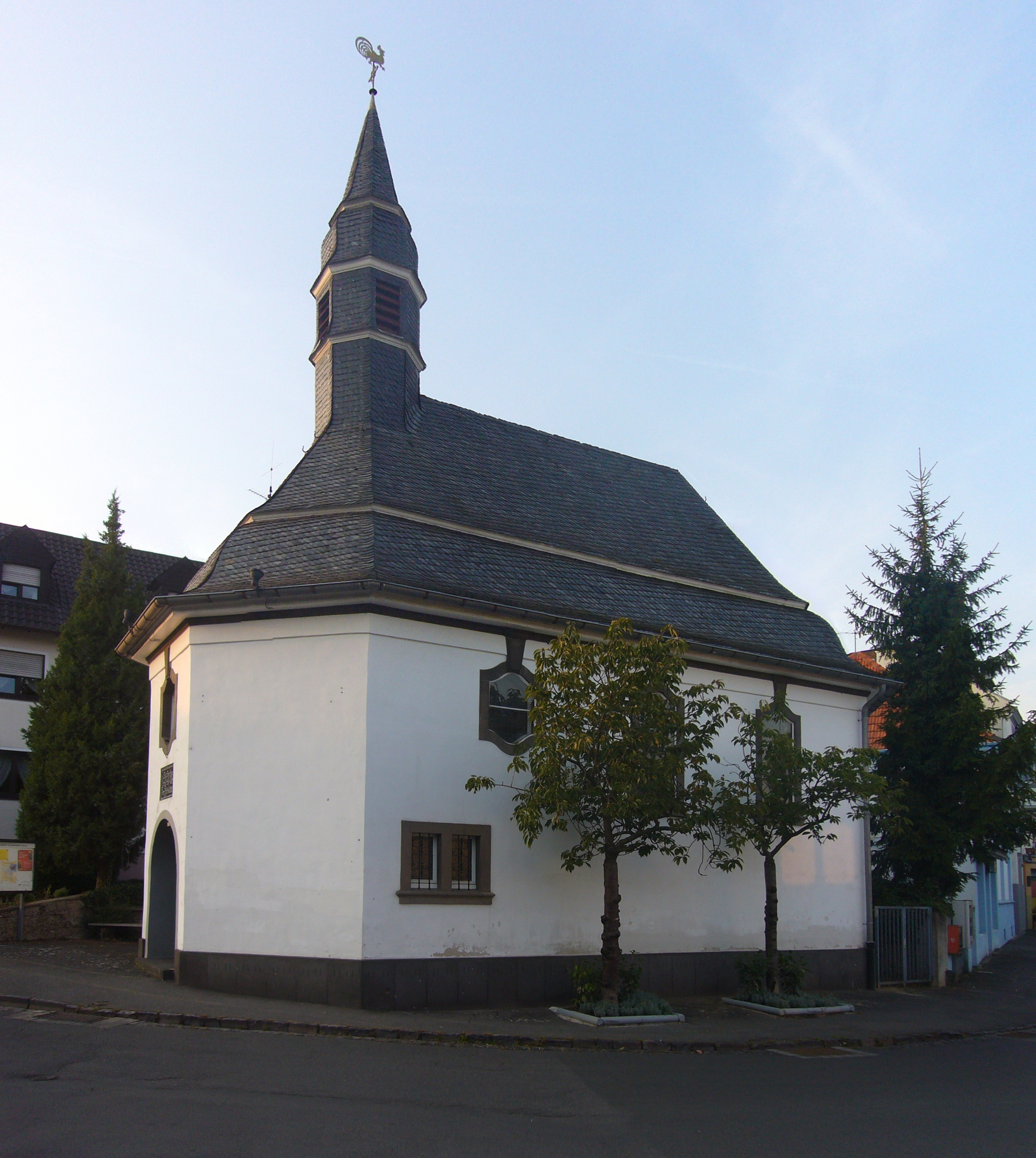 Die Pest-Kapelle in Schweinheim (zusammengesetztes Bild)